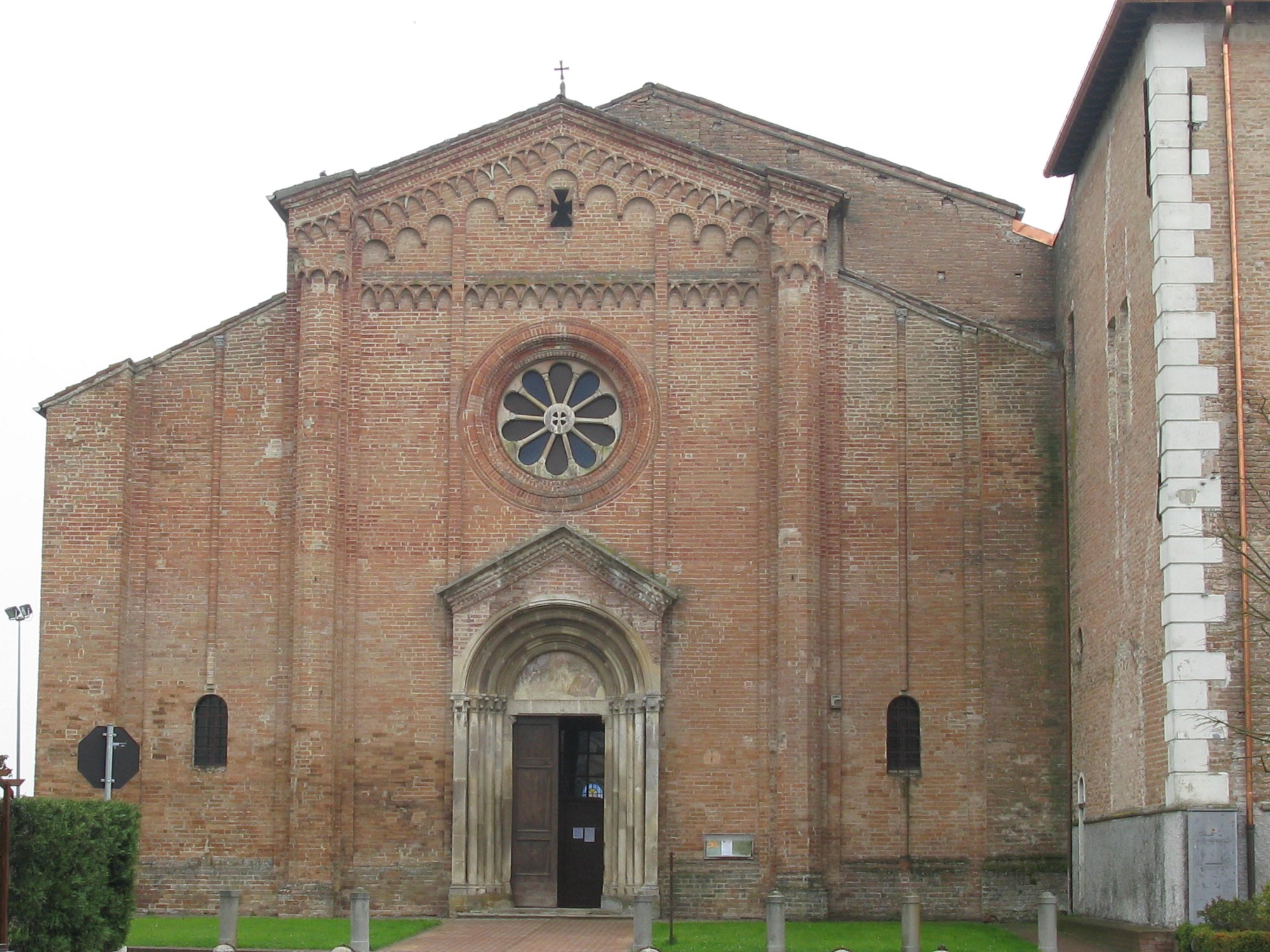 Fontevivo, Abbazia di San Bernardo, secolo XII.